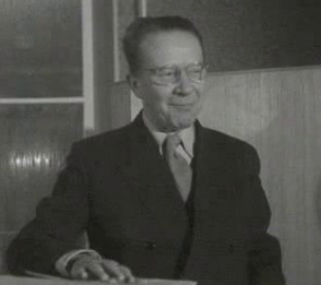 Minister Theo Rutten, Delft 1952